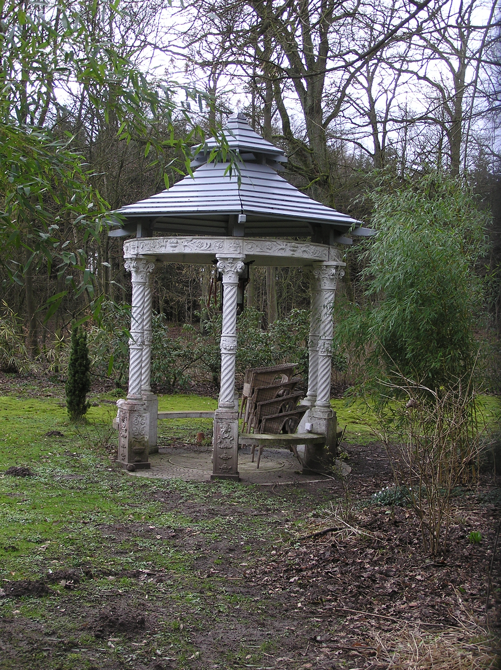 Gut Wotersen Weg zur Fasanerie